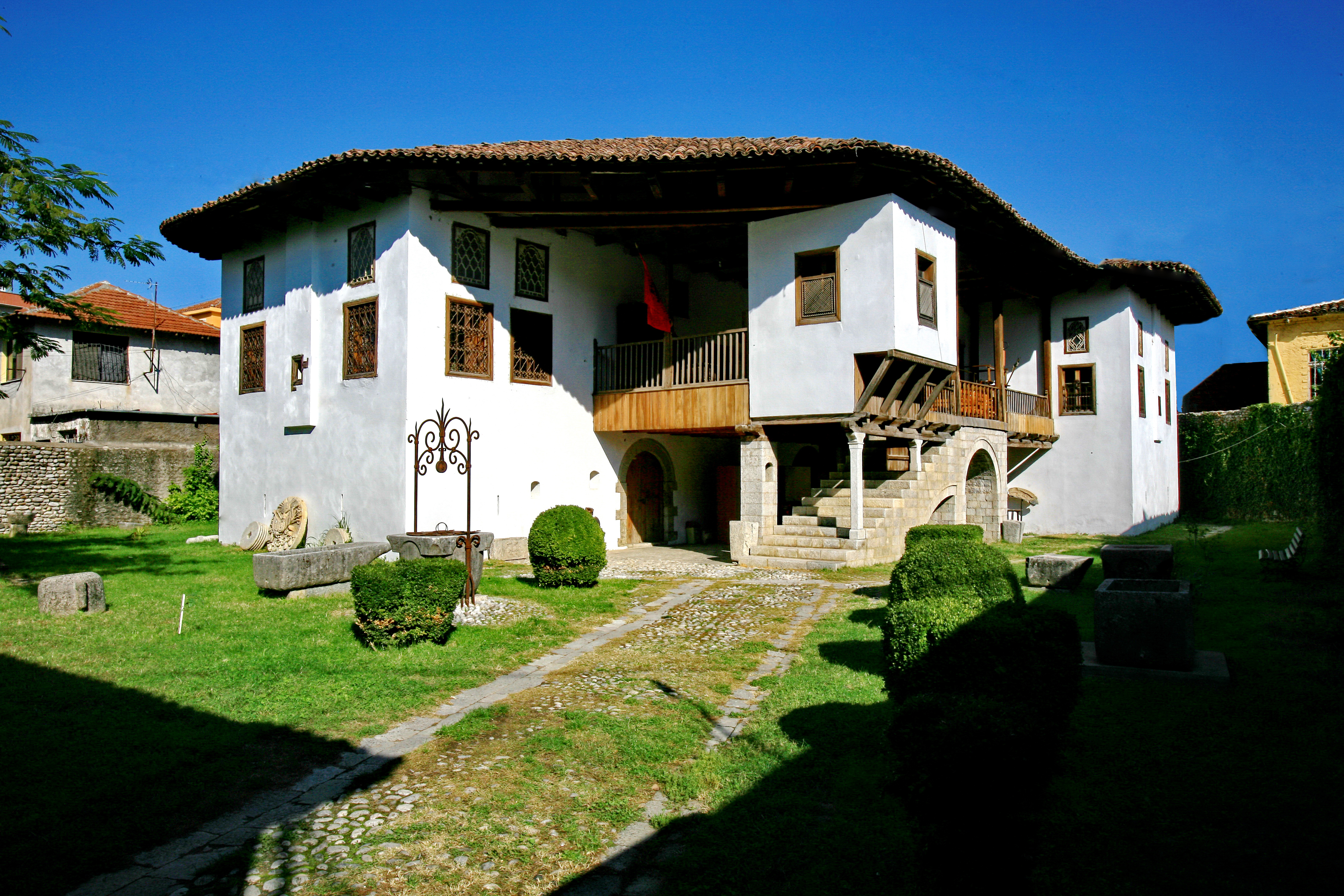 Banesa e Oso Kukës